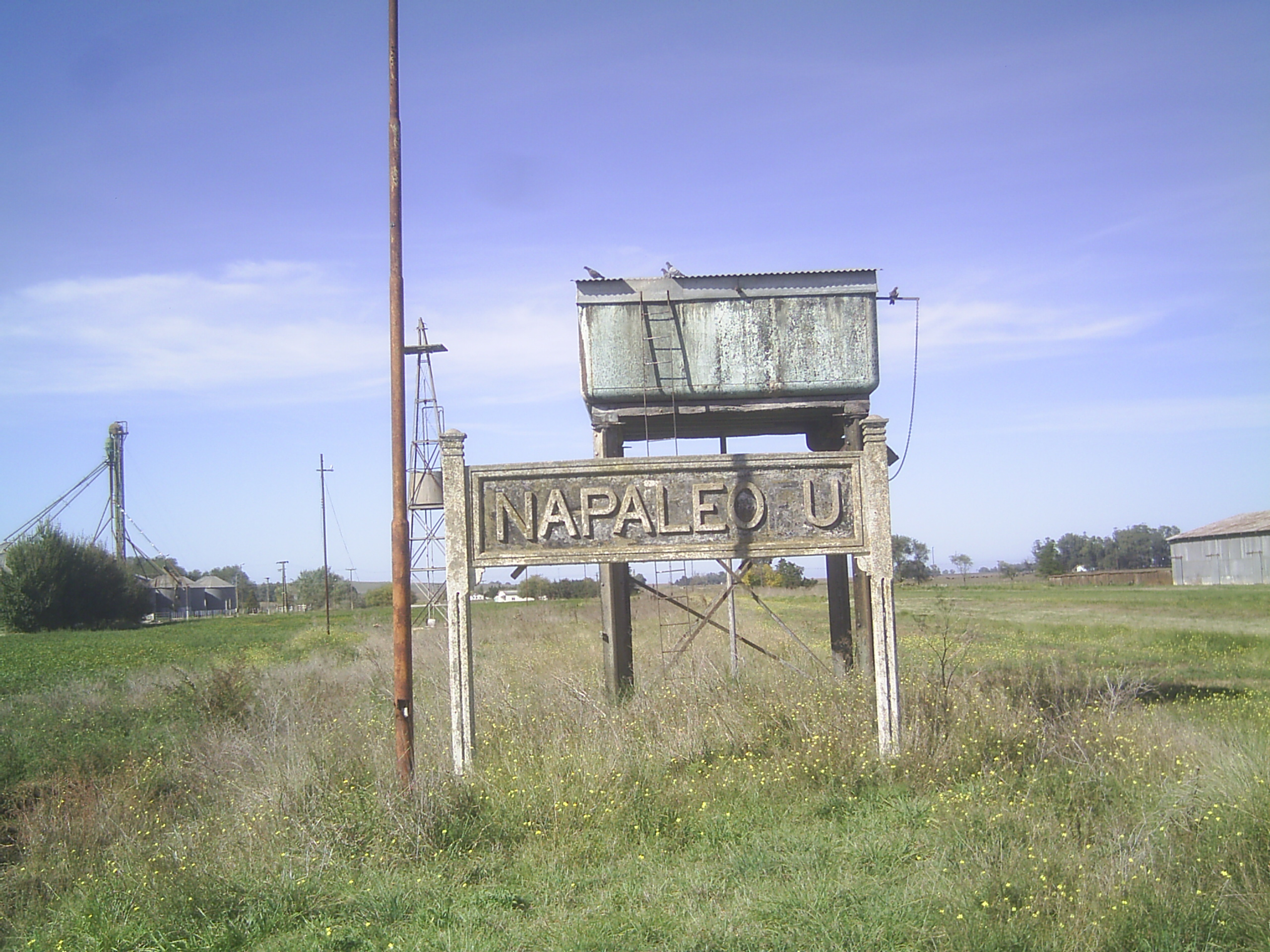 Cartel indicativo de la estacion de ferrocarril